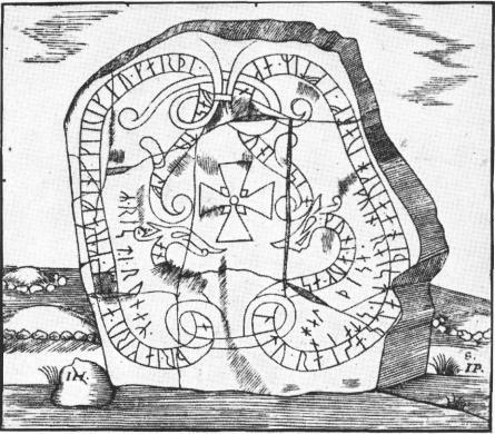 Runstenen U 170 i Bogesund, Vaxholms kommun. Tecknad av Johan Peringskiöld på 1600-talet, publicerad i Bautil. Bilden hämtad från Upplands runinskrifter, band 1.